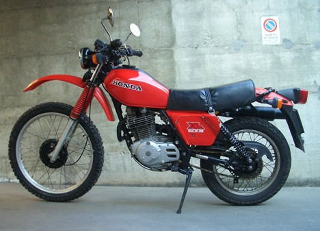 honda xl500 modell 1980